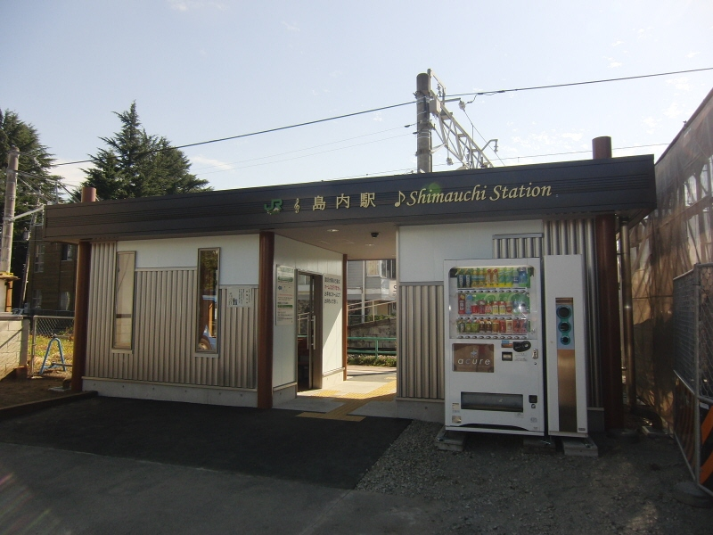 JR東日本の大糸線島内駅の新駅舎です。